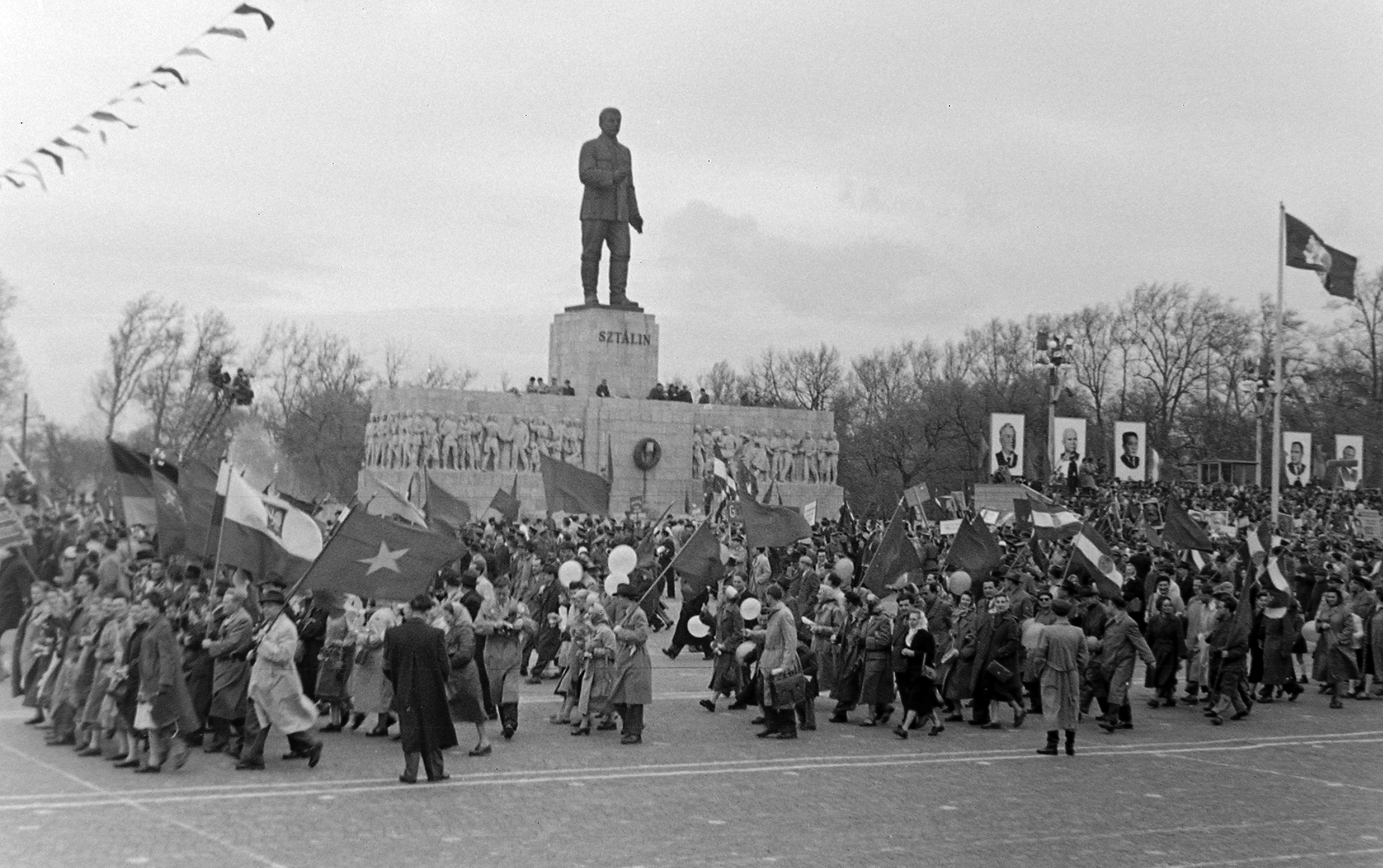 Május 1? Ötvenhatosok tere (Felvonulási tér), Sztálin szobor. Location: Hungary, Budapest XIV. Tags: politics, flag, Joseph Stalin portrayal, relief, baloon, Budapest Title: Ötvenhatosok tere (Felvonulási tér), Sztálin szobor.